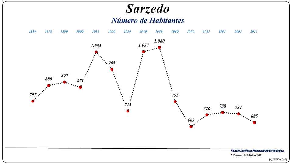 População